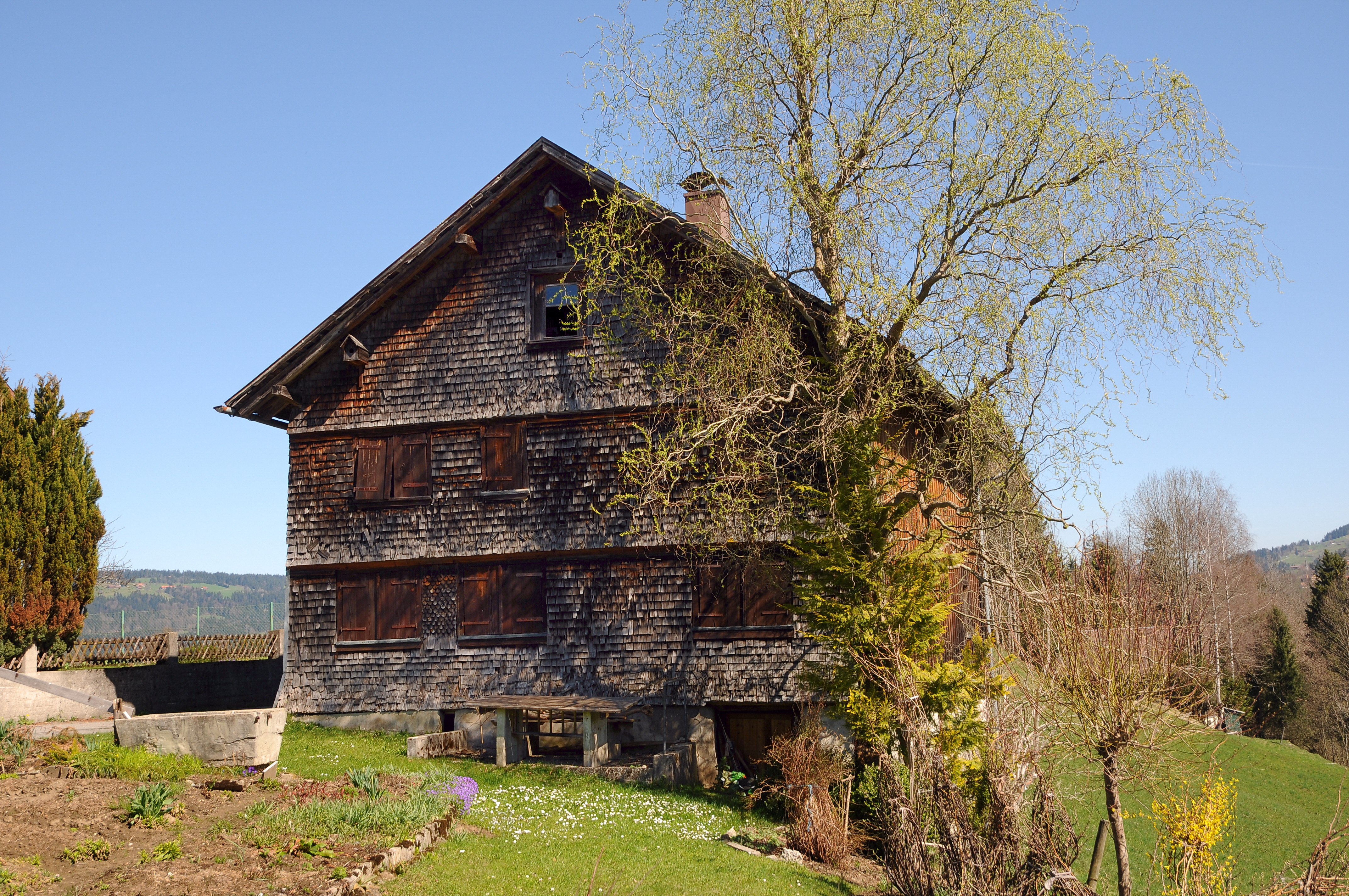 Mesnerhaus im Dorf 4 in Krumbach (Vorarlberg). Das Haus steht unter Denkmalschutz.